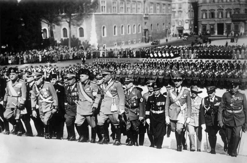 Rom, Italienfahrt der deutschen Frontkämpferverbände Deutsche Frontkämpfer in Italien. Die Italienfahrt der Vereinigung der Deutschen Frontkämpferverbände, an der Männer aller Waffen teilnehmen - auch die Schutztruppe ist vertreten, findet im Lande Mussolinis eine Aufnahme, die an Herzlichkeit und Begeisterung kaum überboten werden kann. Am Freitagvormittag wurden sämtliche Teilnehmer im Hof des Quirinals vom König und Kaiser begrüsst. Anschliessend ging der Marsch zum Grabe des Unbekannten Soldaten, wo der Präsident der Vereinigung, der Herzog von Coburg, in Anwesenheit italienischer Kriegerbünde und des Präsidenten Delcroix sowie den Vertretern der Regierung und der Armee einen Kranz niederlegte. U.B.z. wie sich der Herzog von Coburg in Begleitung des Reichskriegsopferführers Oberlindober und des Präsidenten Delcroix zum Grabe des Unbekannten Soldaten begibt. 19.3.1938 [Herausgabedatum] Abgebildete Personen: Sachsen-Coburg und Gotha, Karl-Eduard von: 1884-1954, Herzog, Präsident des Deutschen Roten Kreuzes, Deutschland Information added by Wikimedia users.*